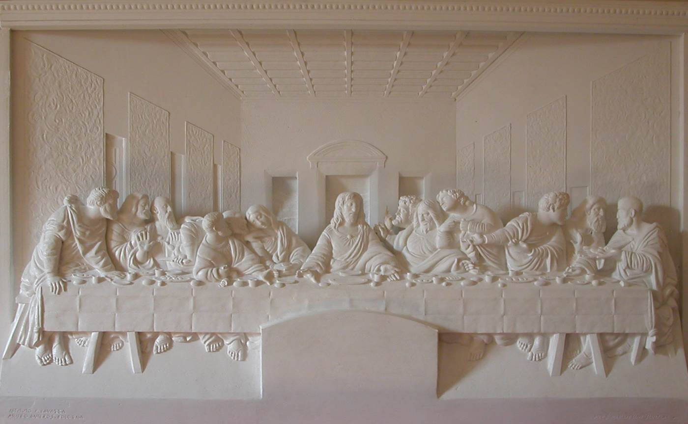 Cenacolo - Leonardo da Vinci (Bassorilievo tattile - Museo "Anteros")